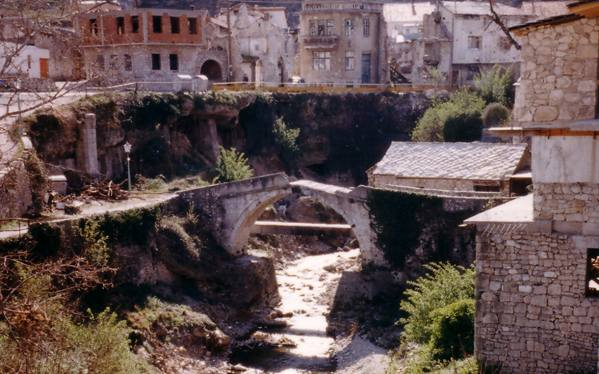 Modell der Stari Most in Mostar - GNU-FDL - selbst geknipst